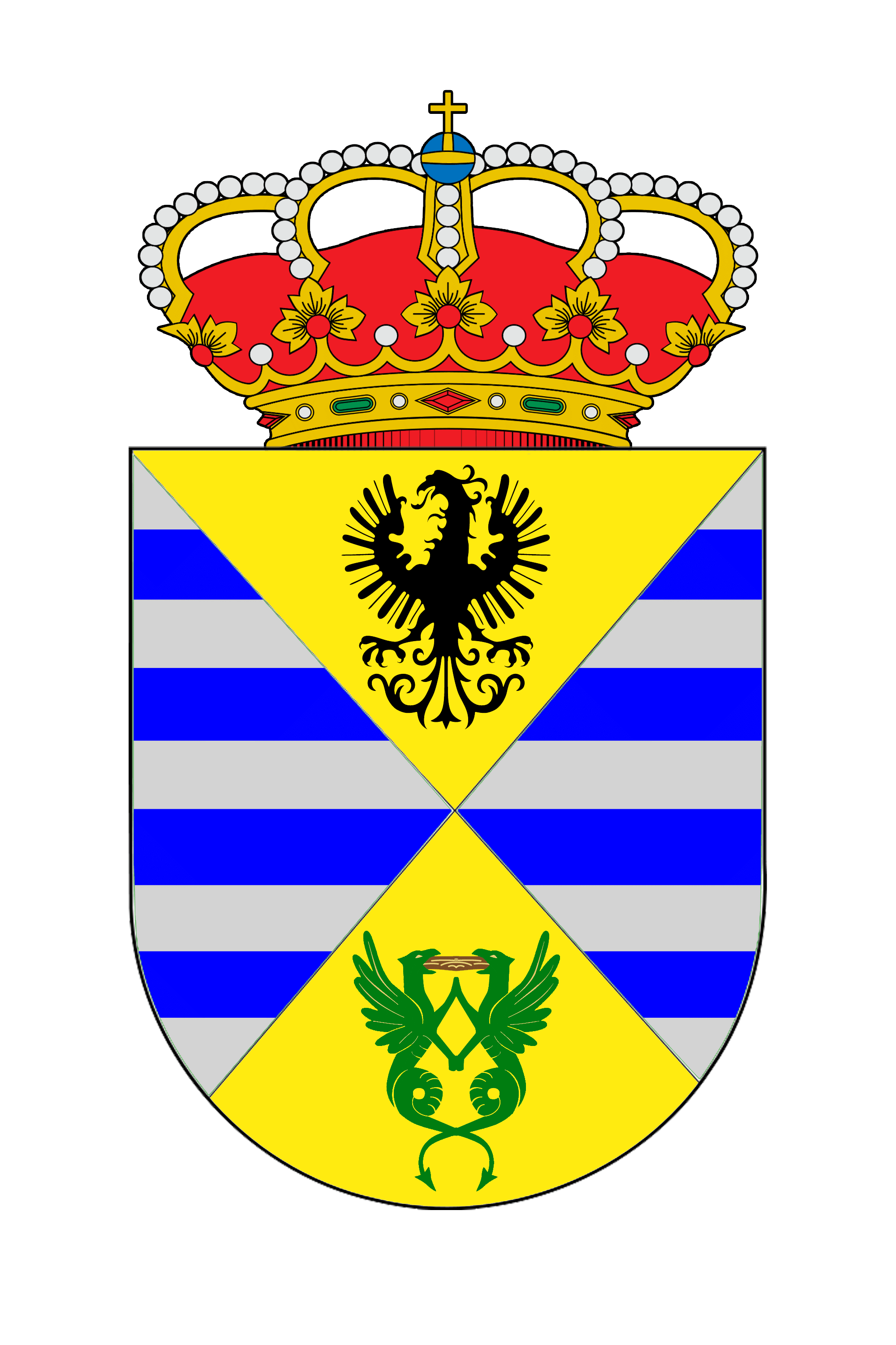 Escudo de la provincia de Concepcion, Chile